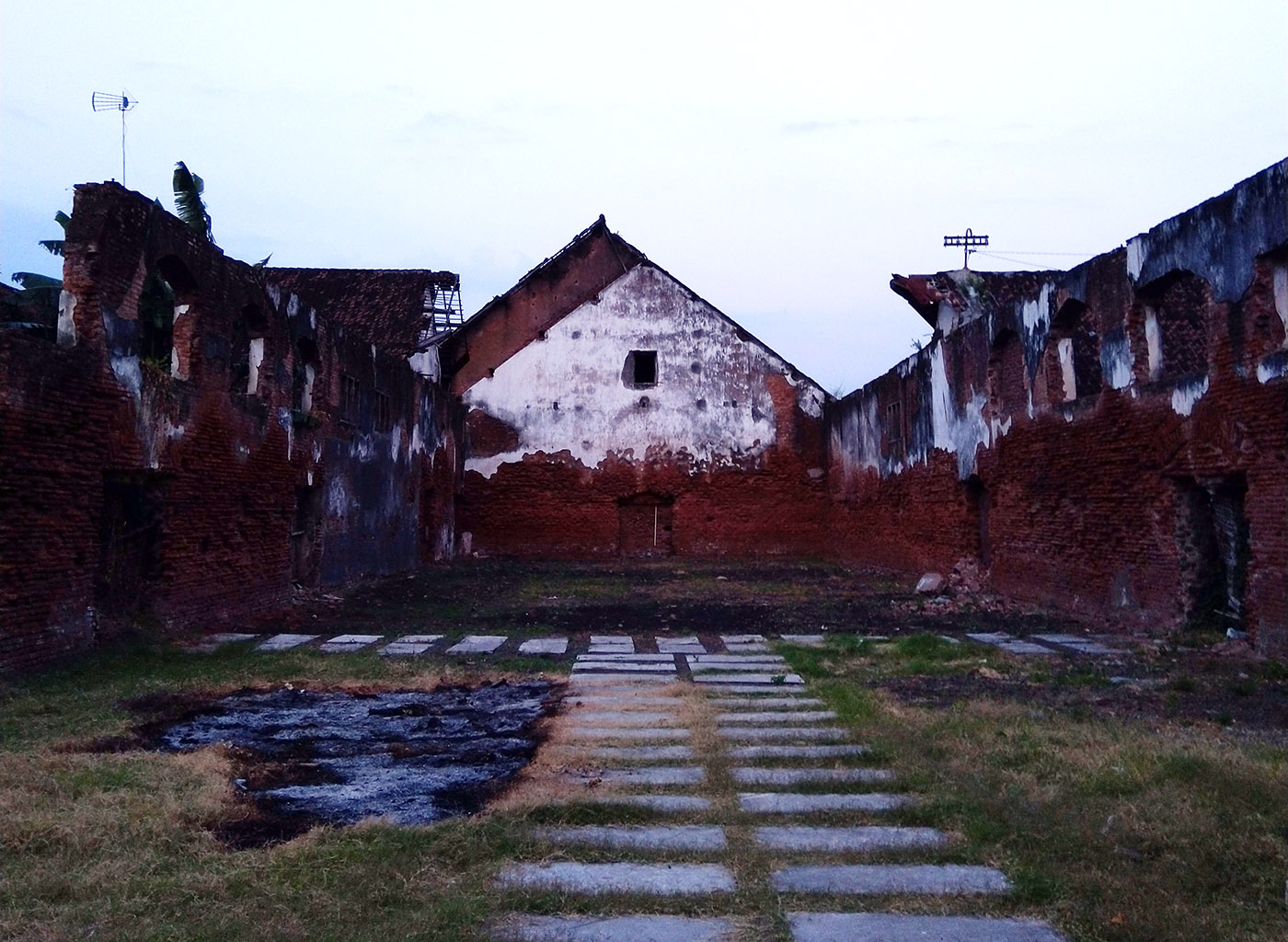 Tampak dalam Benteng Mayangan Kota Probolinggo